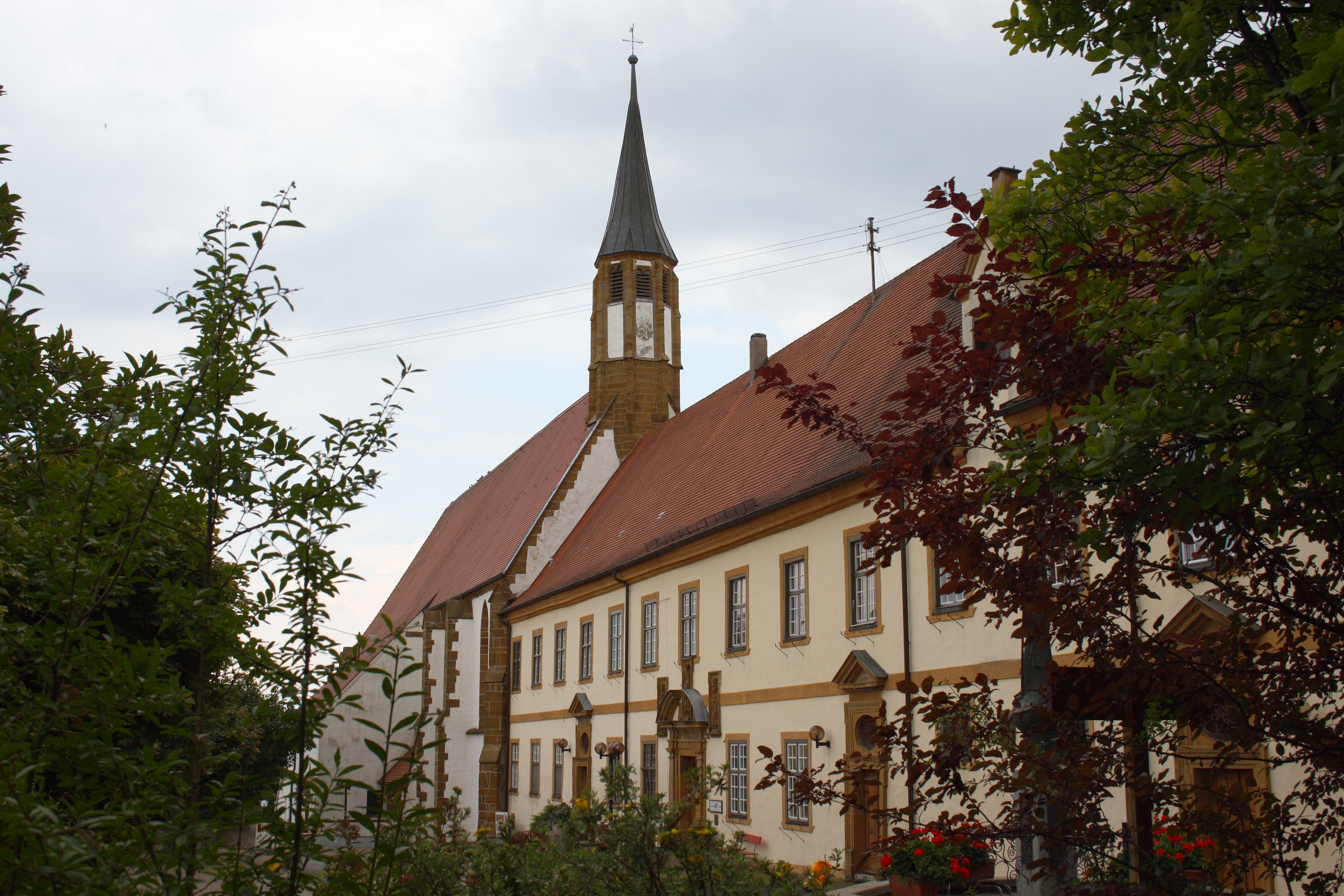 Katholische Pfarrkirche Mariä Himmelfahrt, ehemalige Kirche des Zisterzienserinnenklosters in Kirchheim am Ries im Ostalbkreis (Baden-Württemberg), Kirche und ehemalige Klostergebäude